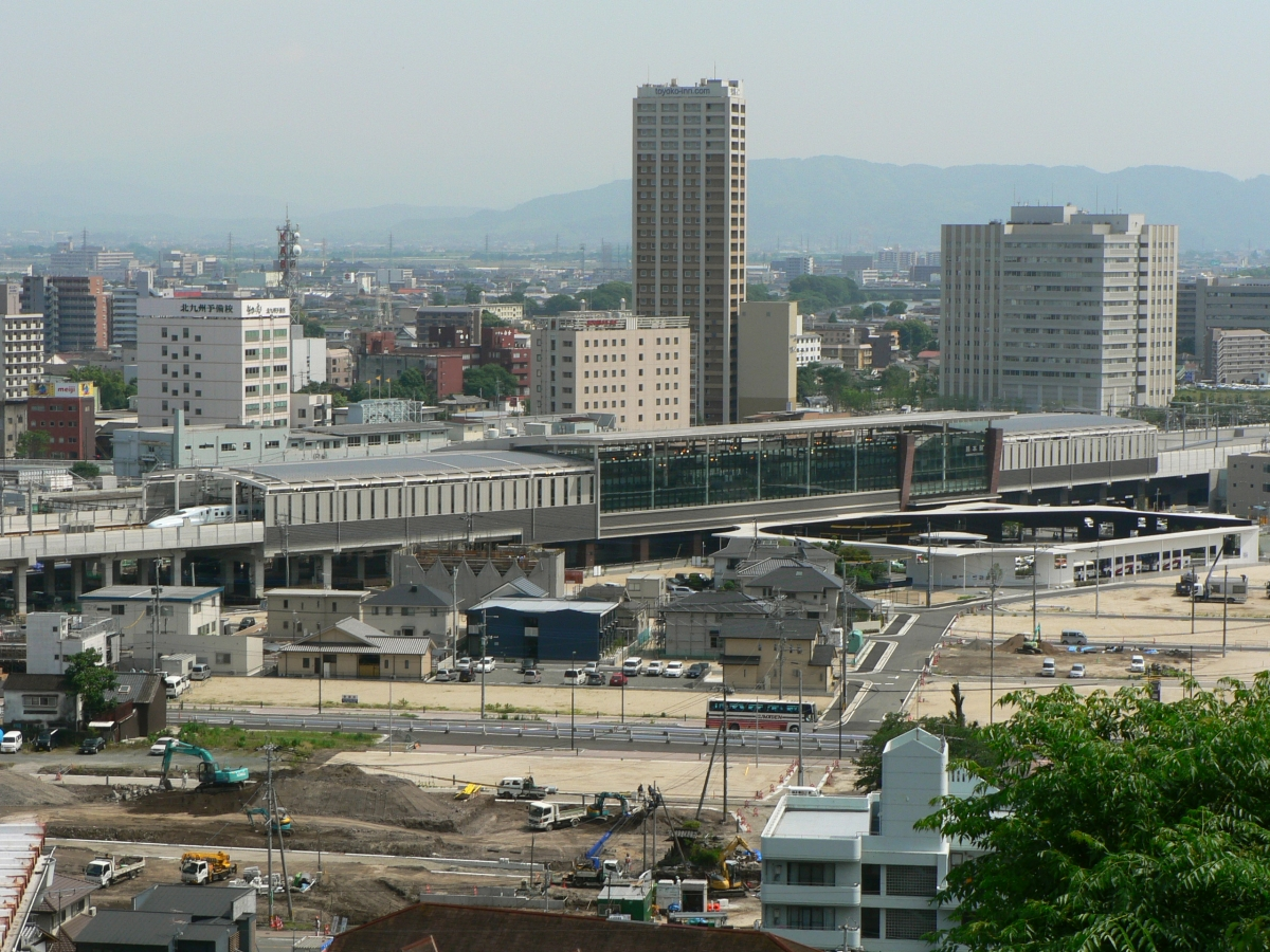 熊本駅の新幹線口(西口)